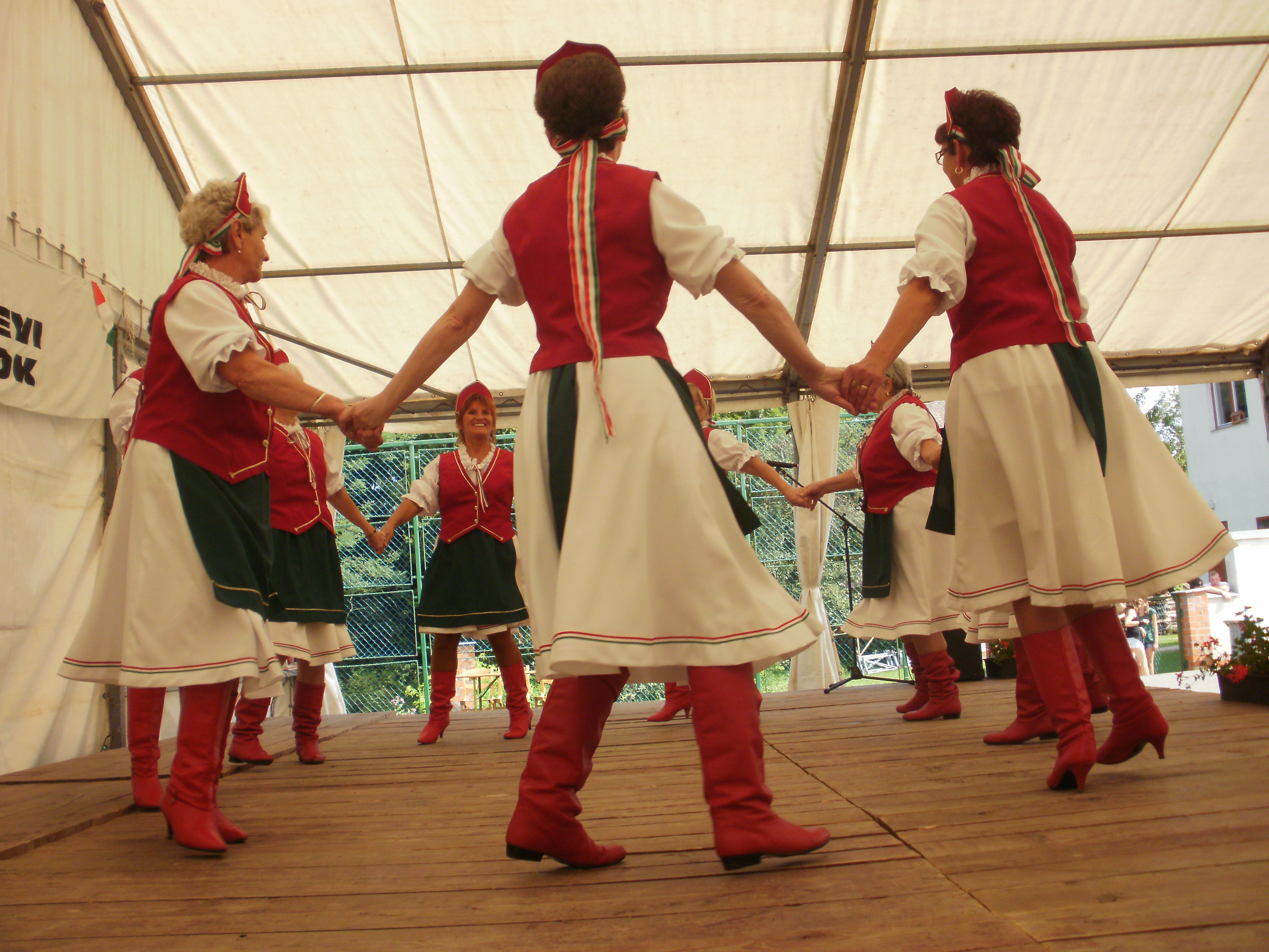 Program a Felsőszölnöki falunapon (Vas megye)